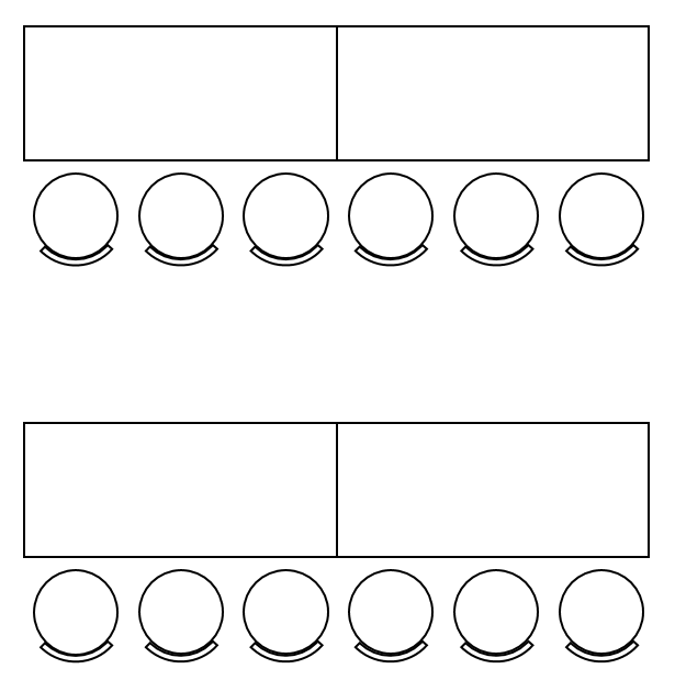 Bordoppsett Klasserom